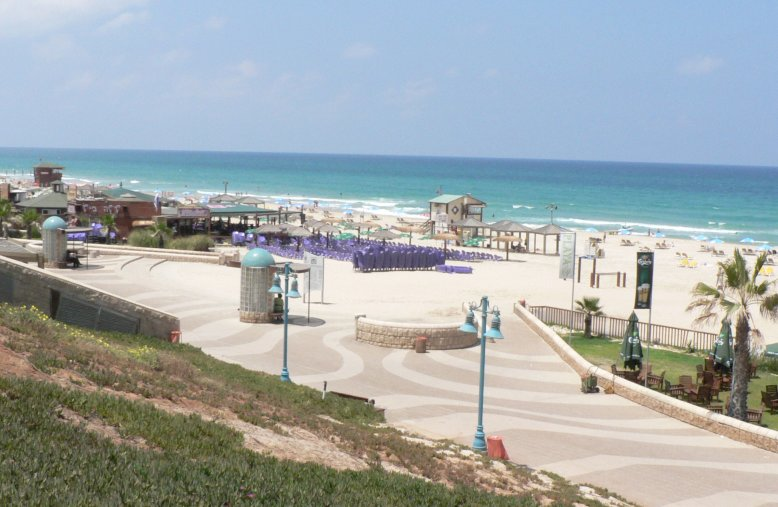 Rishon LeZion beach חוף הים של ראשון לציון